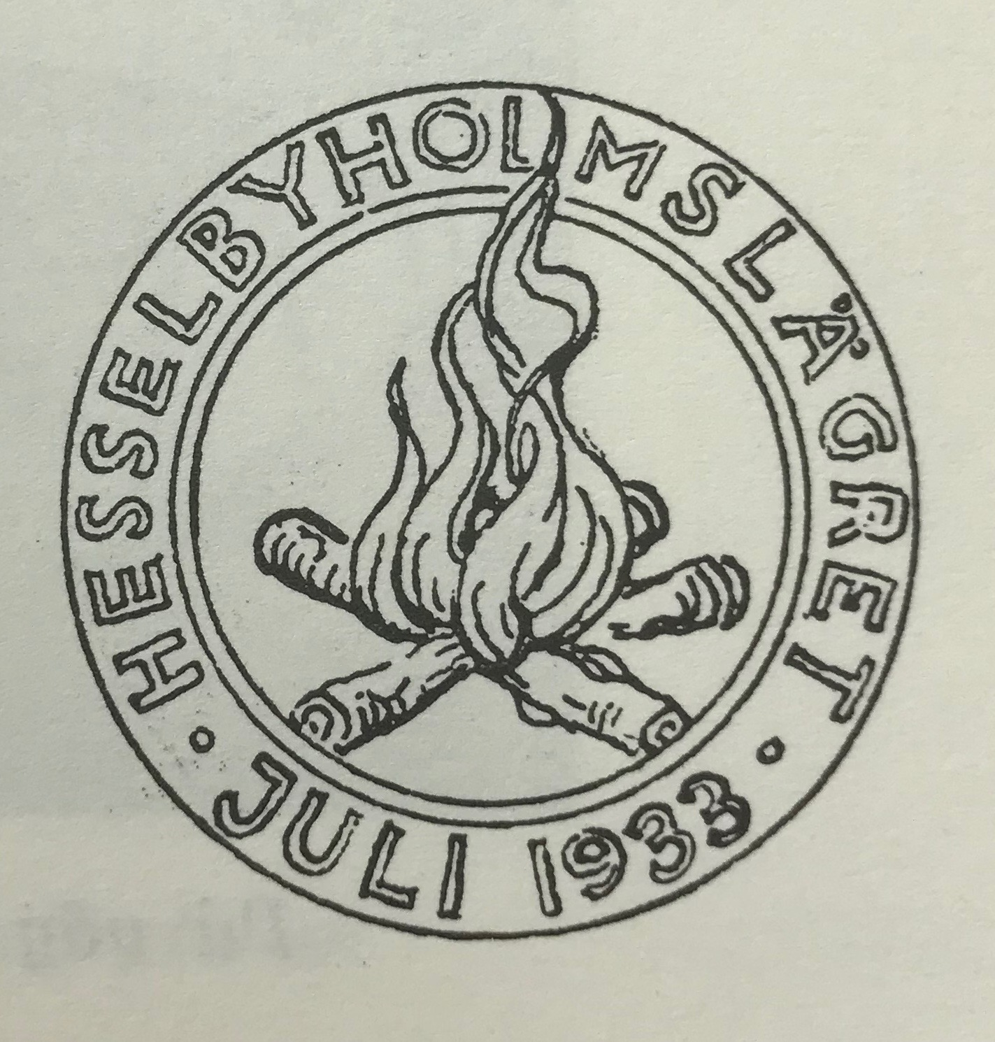 Lägermärke för Sveriges flickors scoutförbunds förbundsläger Hesselbyholmslägret 1933.